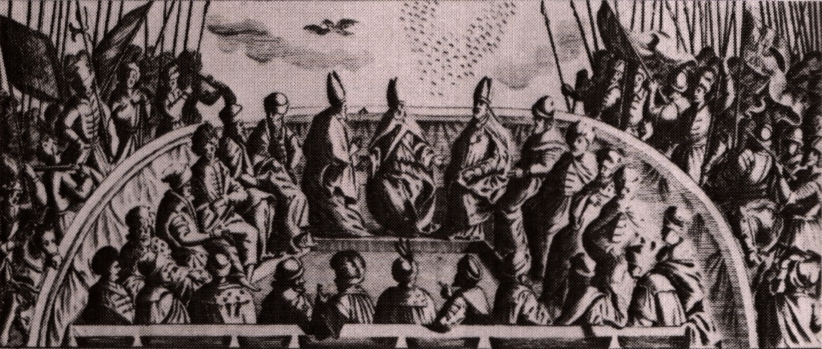 Election of Michał Korybut Wiśniowiecki.